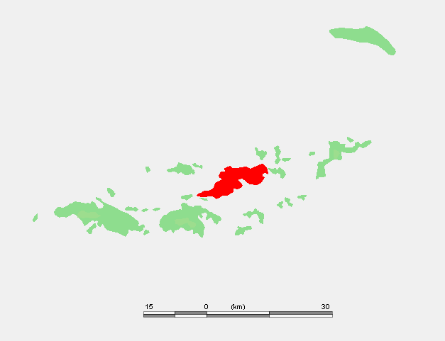 Caribbean - Tortola.PNG